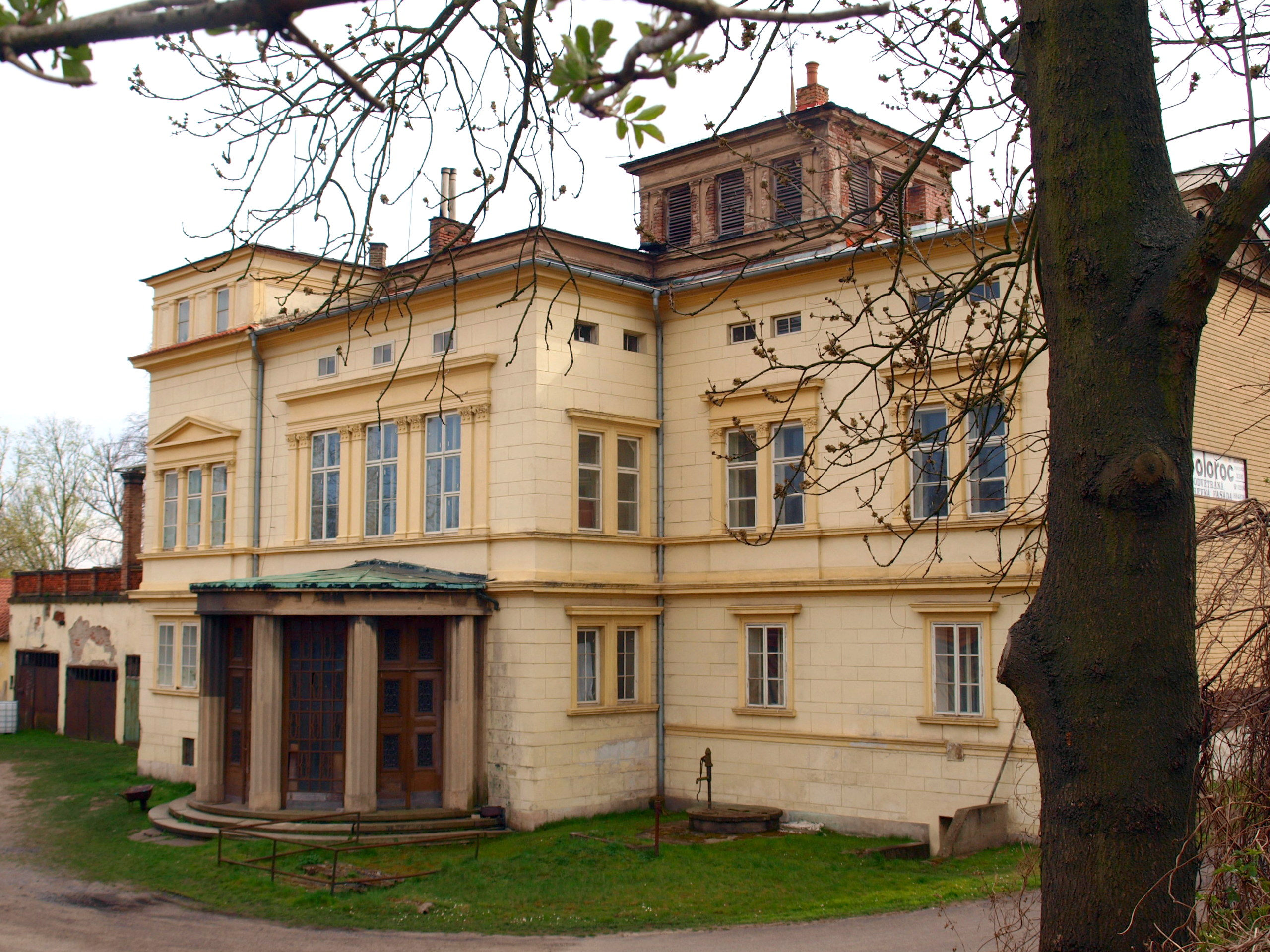 Zámeček Na Štěpáně